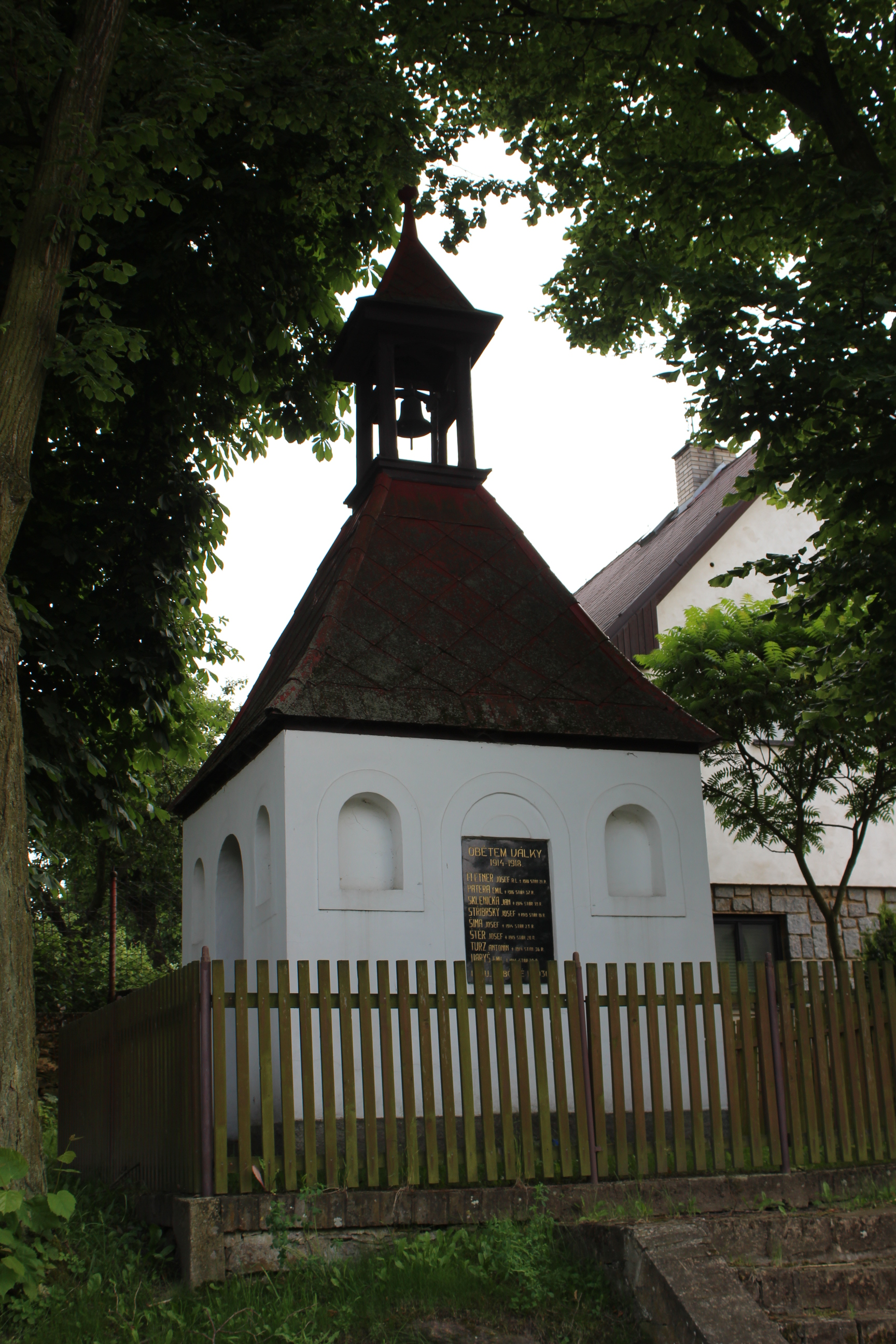 Kaplička v Chlumu, části Pavlíkova.